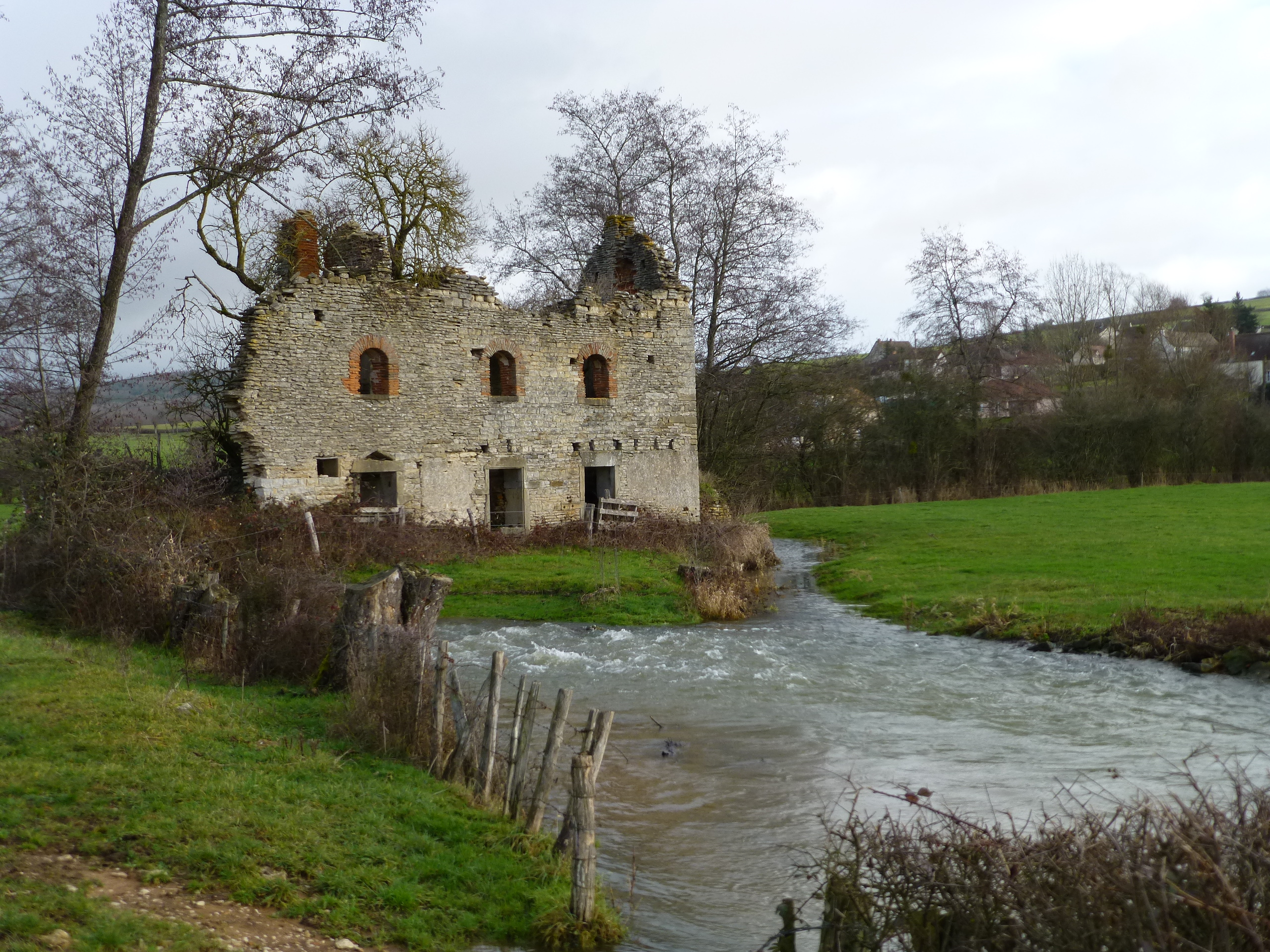 La rivière Guye, vieux Moulin à Germagny